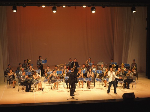 Zdjęcie wykonane podczas koncertu Krakowskiej Orkiestry Staromiejskiej, 2010-01-03